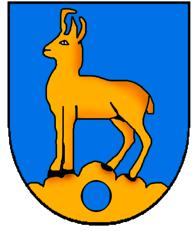 Wappen: Elm siehe auch: Copyright Wappen Glarus